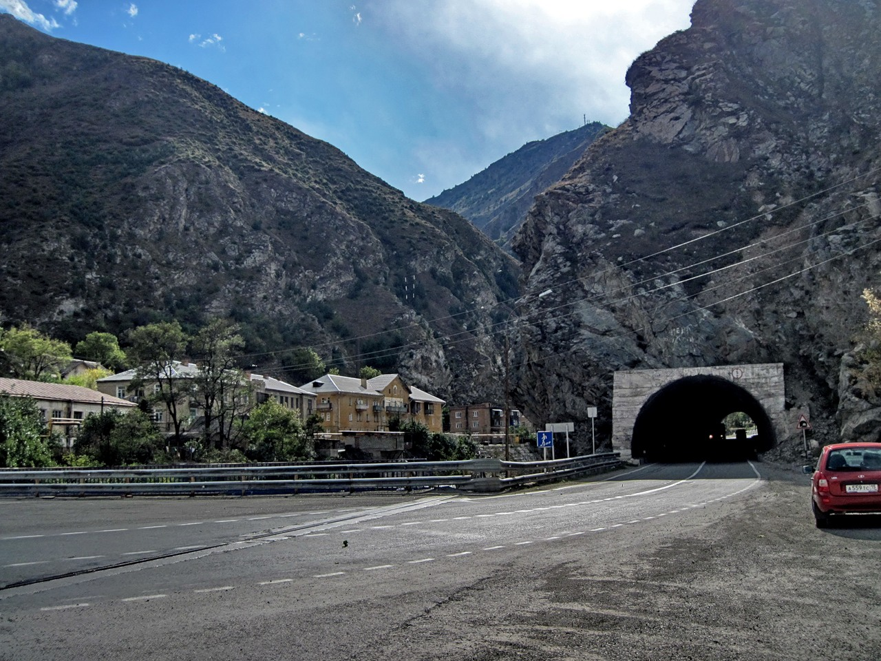 Minista urbeto Mizur en Nord-Osetio (suda Rusio).